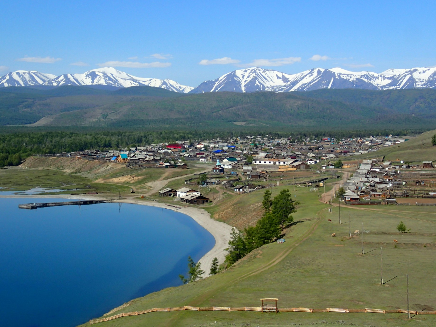 Baikalskoe